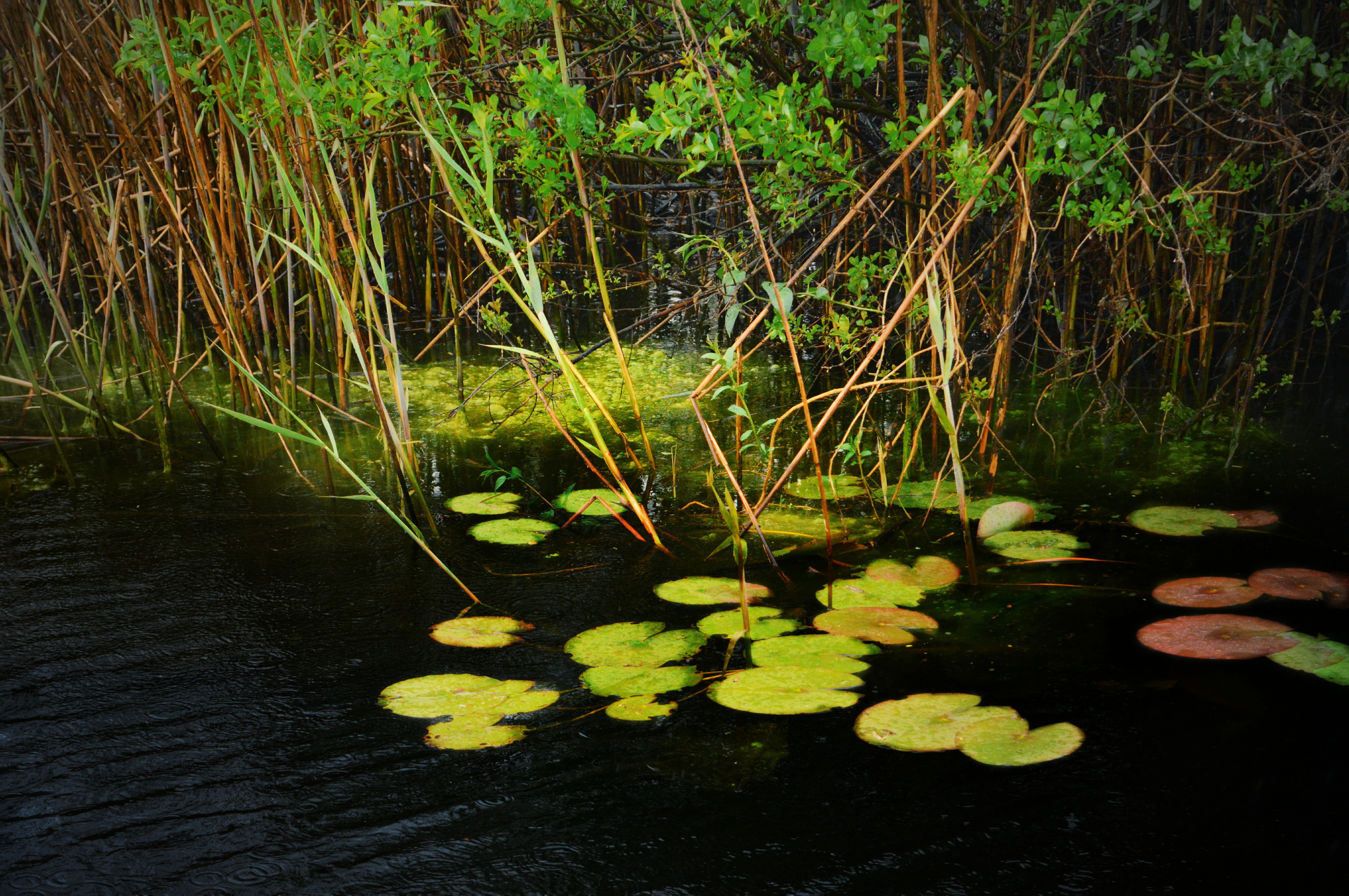 Ово је фотографија заштићеног природног добра у Србији под шифром: РП16This is a a photo of a natural area in Serbia with ID: РП16 Специјални резерват природе Обедска бара